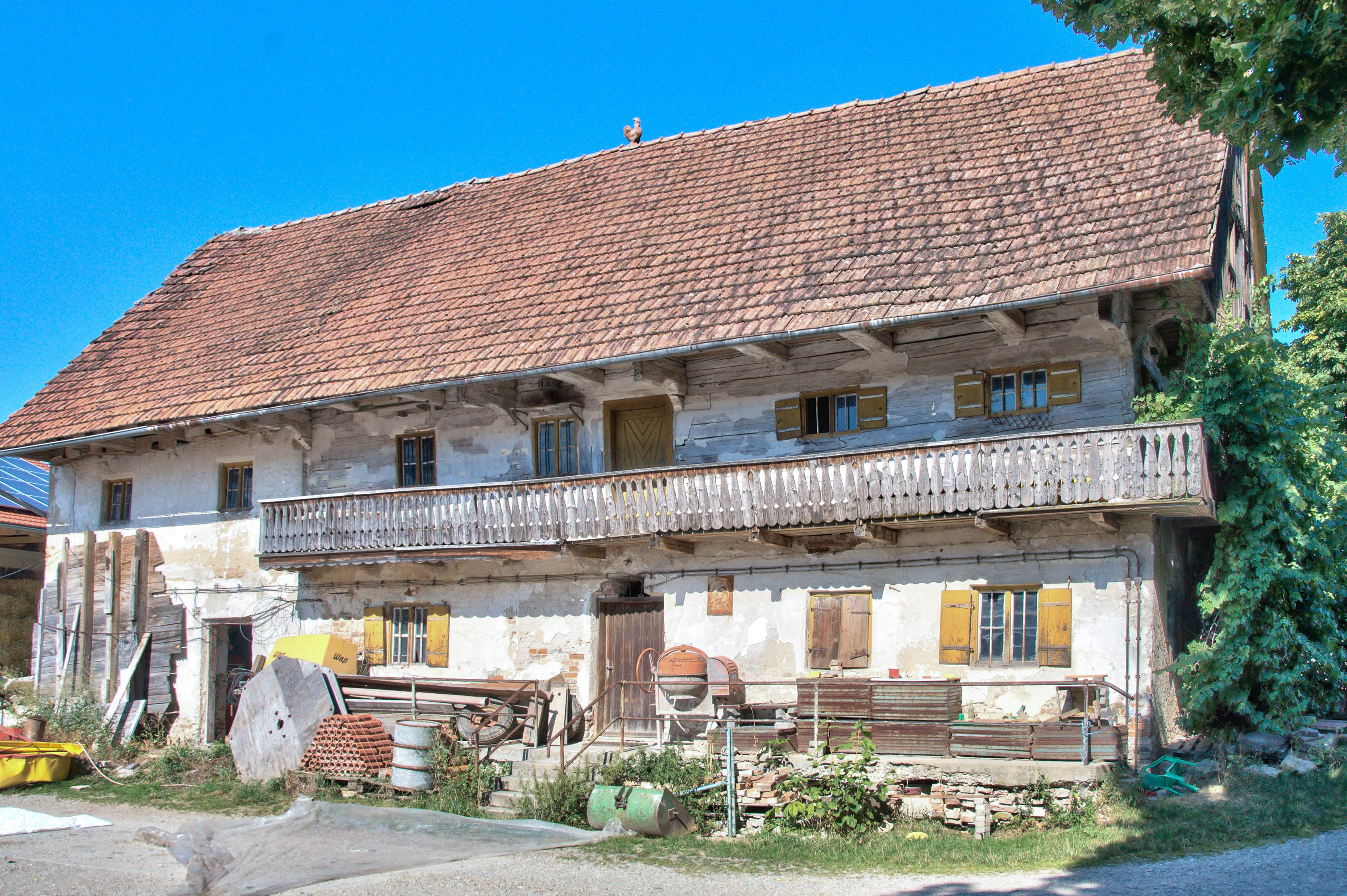 Weihmichl-Schachten: Haus Nr 2 || Bauernhaus | D-2-74-187-10 | Wohnstallhaus eines Dreiseithofs: zweieinhalbgeschossiger Blockbau mit Trauf- und Giebelschrot, 18 Jahrhundert